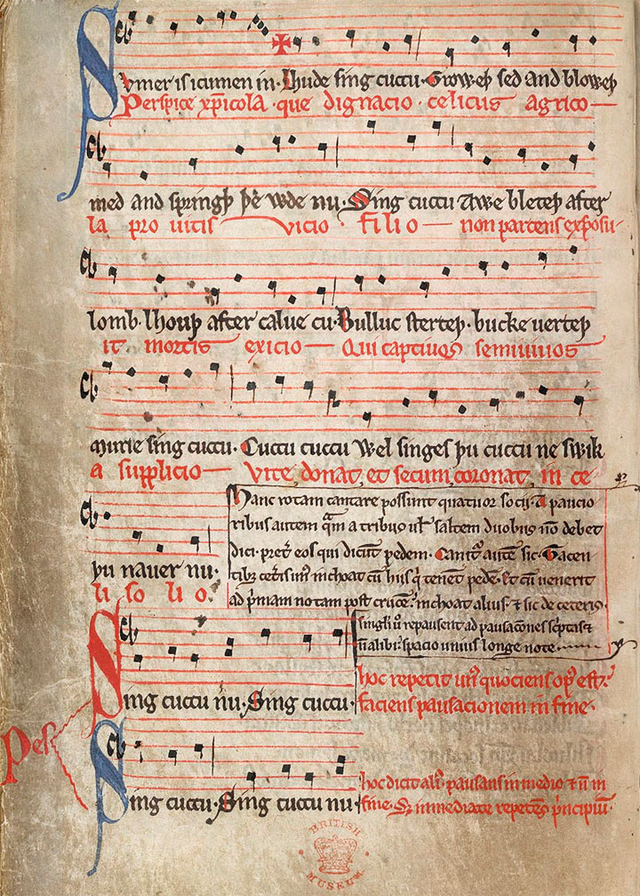 MS Harley 978, f. 11v, heute in der British Library, erste überlieferte Aufzeichnung des Kanons Sumer is icumen in, entstanden kurz vor 1300